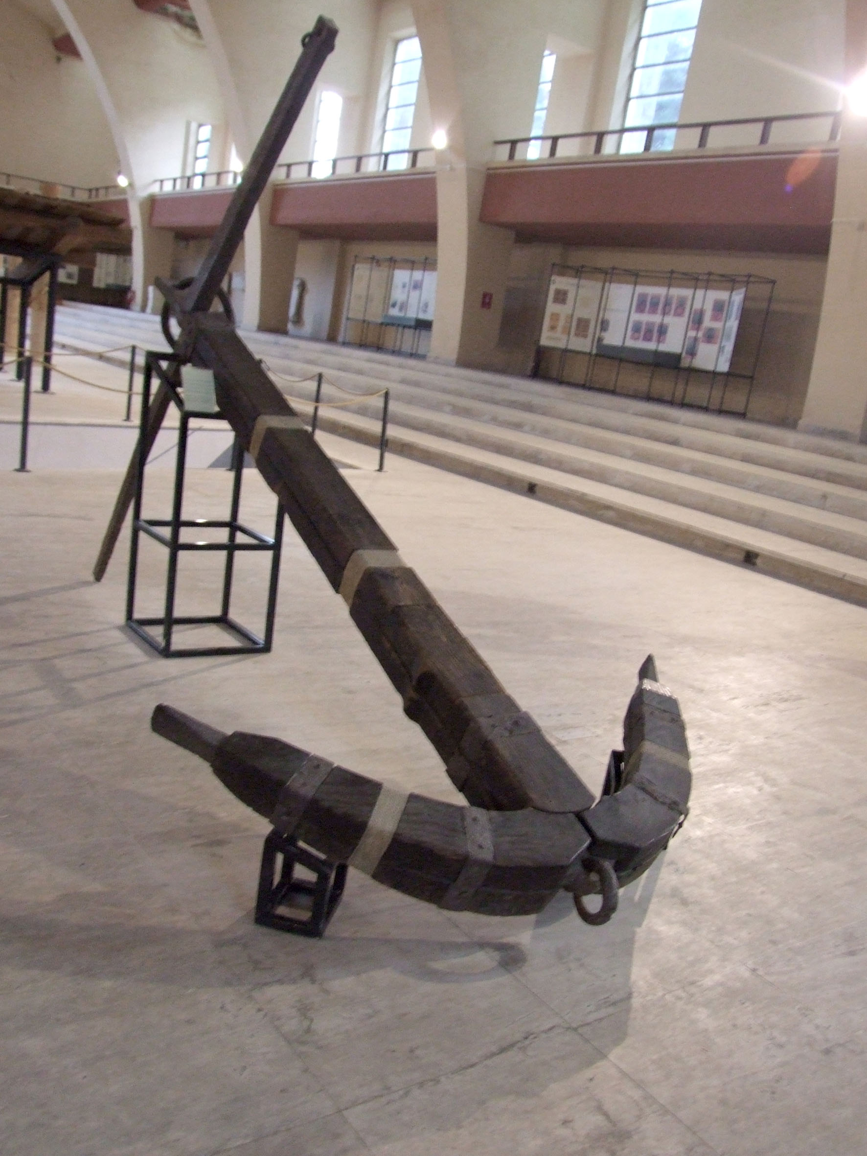 Museo delle Navi, ancora antica, Nemi, Roma